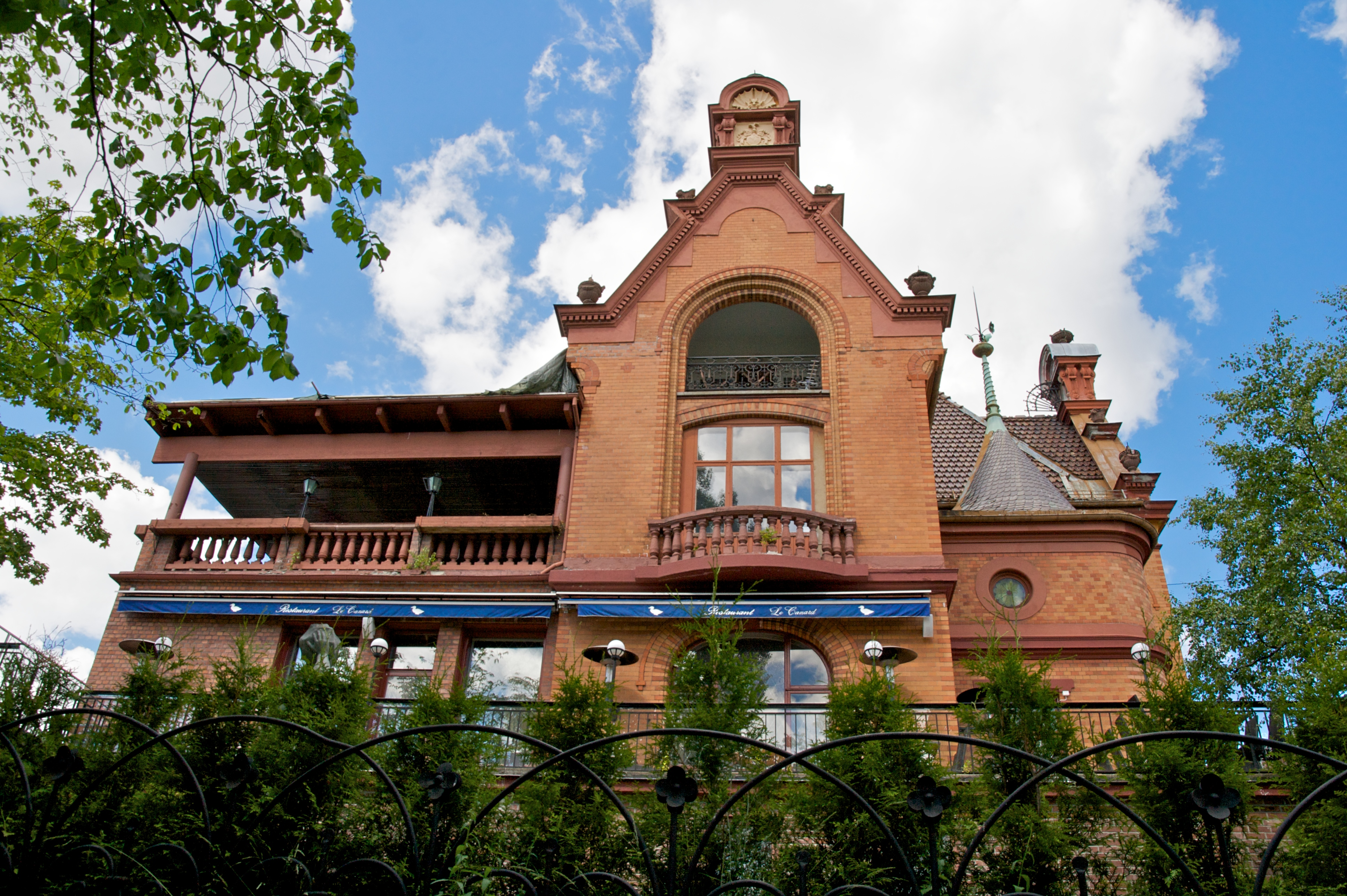 President Harbitz' gate 4 på Frogner i Oslo. Her holder restauranten Le Canard til.